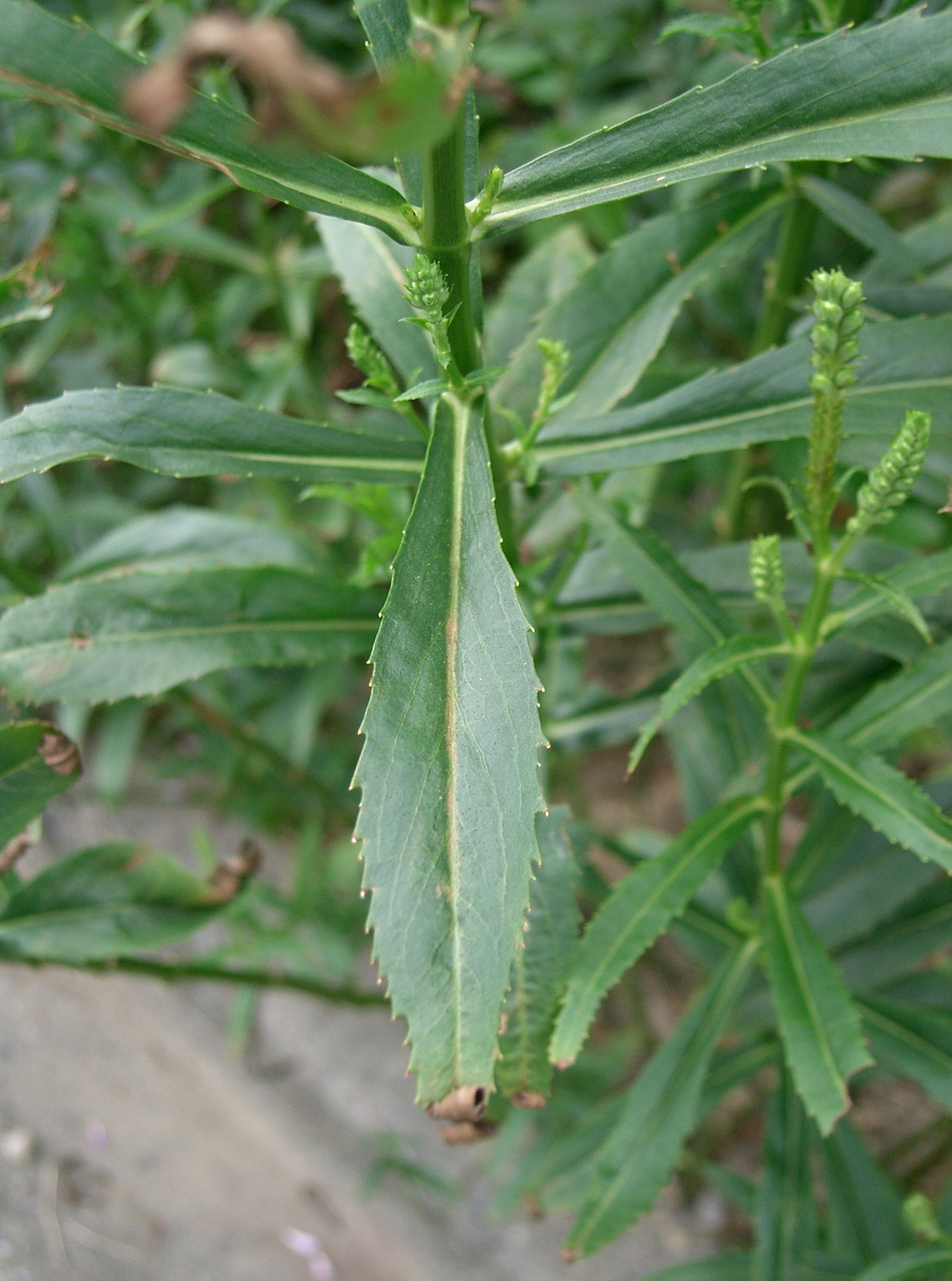 Physostegia virginiana